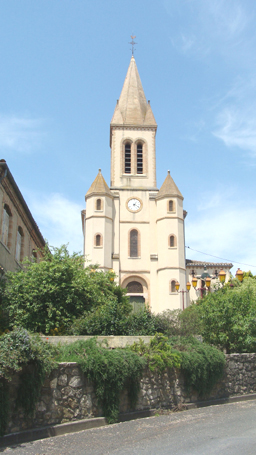 Eglise de Salvagnac, Midi-Pyrénées, France.